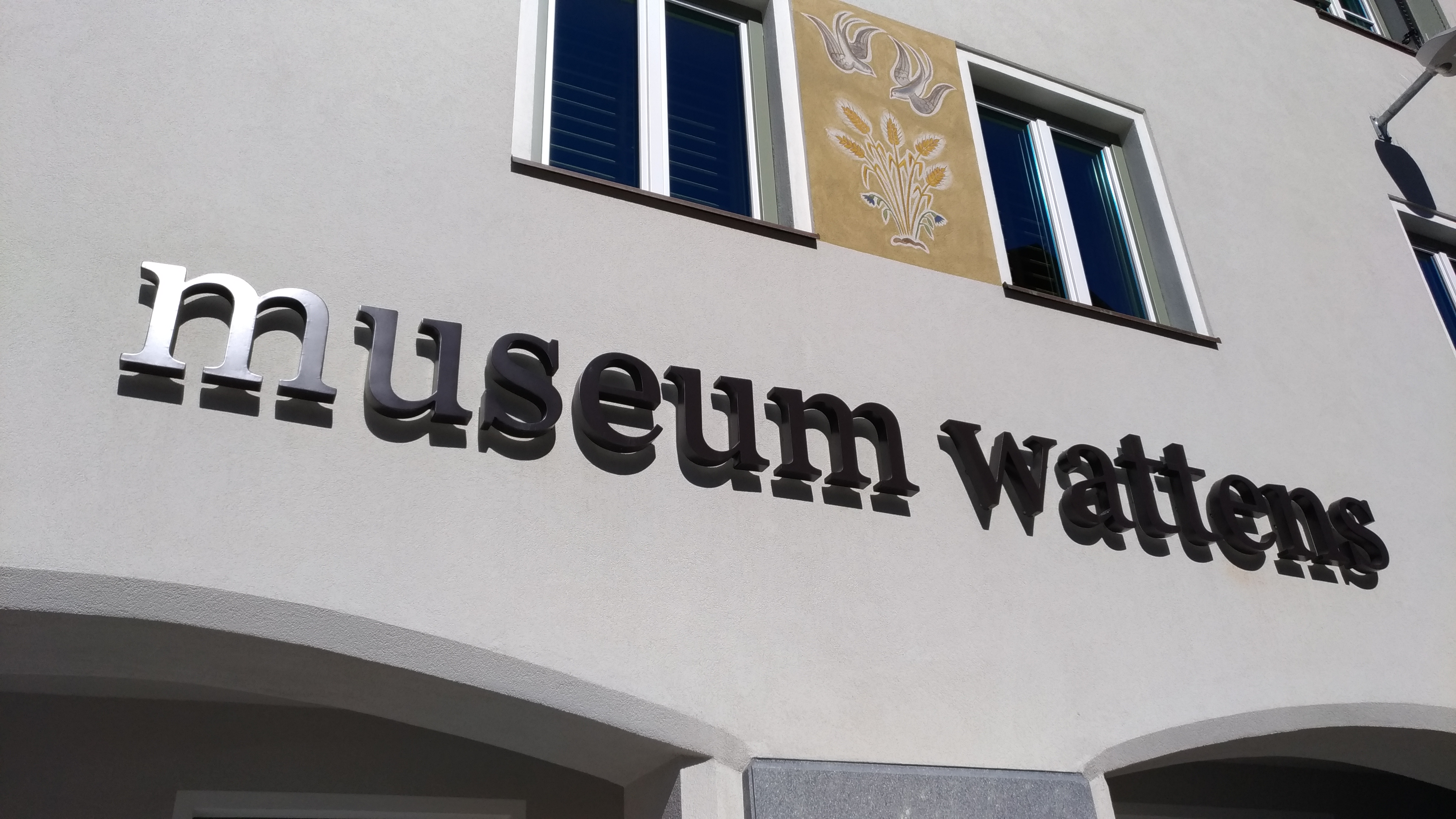 Museum Wattens, Außenansicht